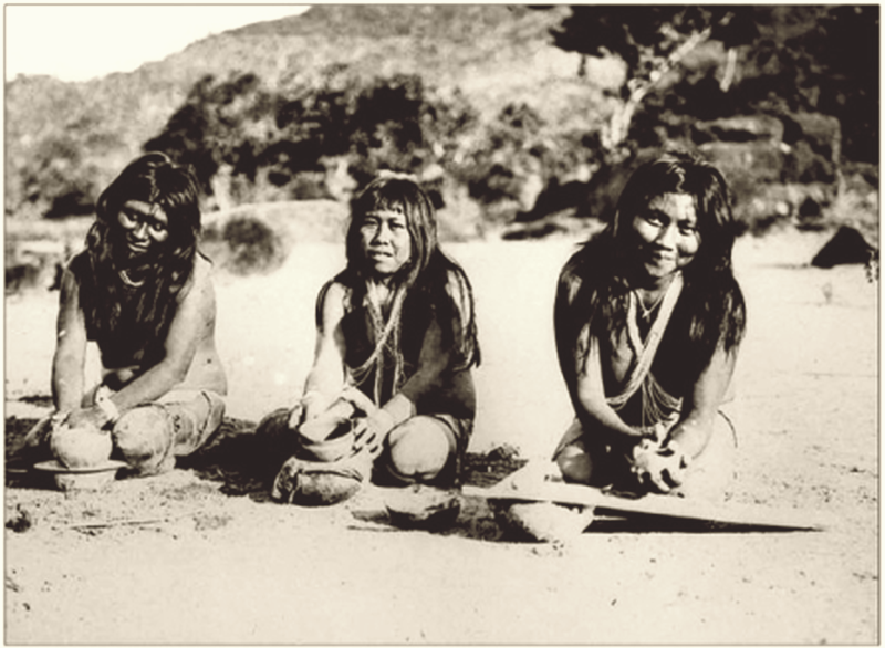 Índias no centro da aldeia.